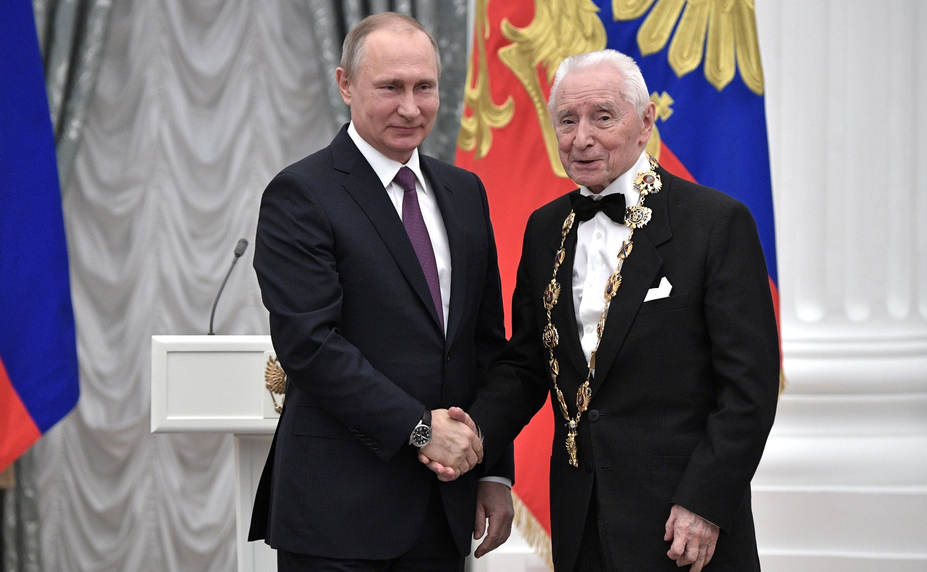 На церемонии вручения государственных наград. Орденом святого апостола Андрея Первозванного награждён Юрий Григорович – балетмейстер Государственного академического Большого театра.